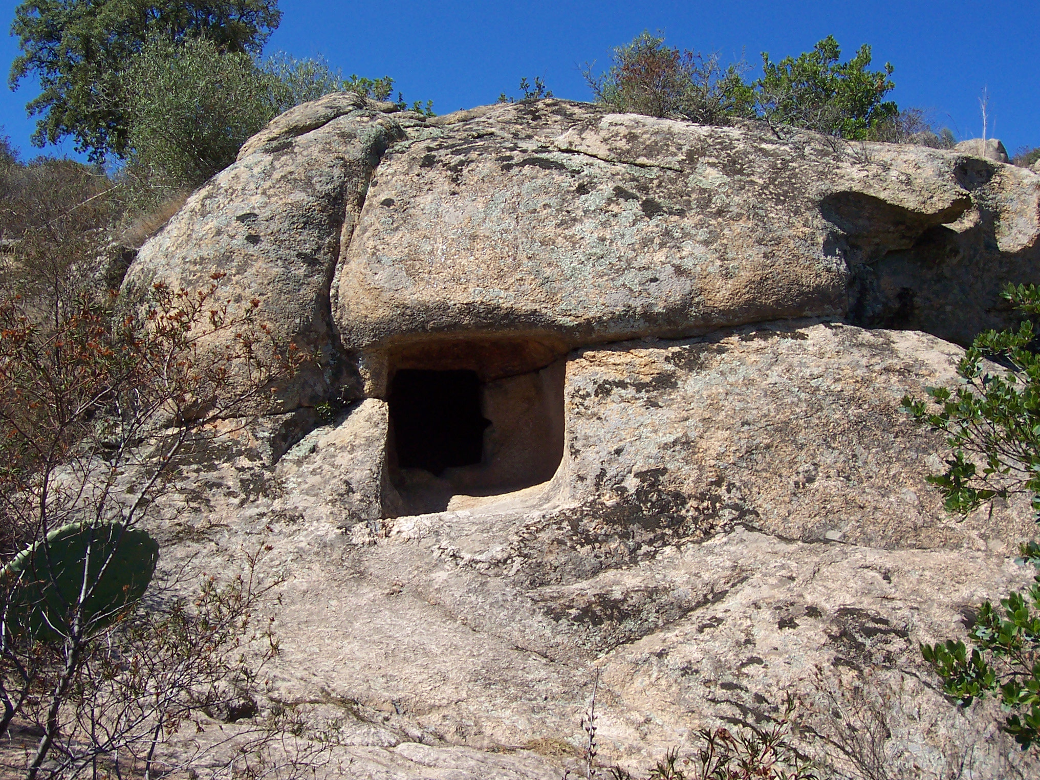 Domus de Janas nella necropoli nuragica di Lotzorai (Og).